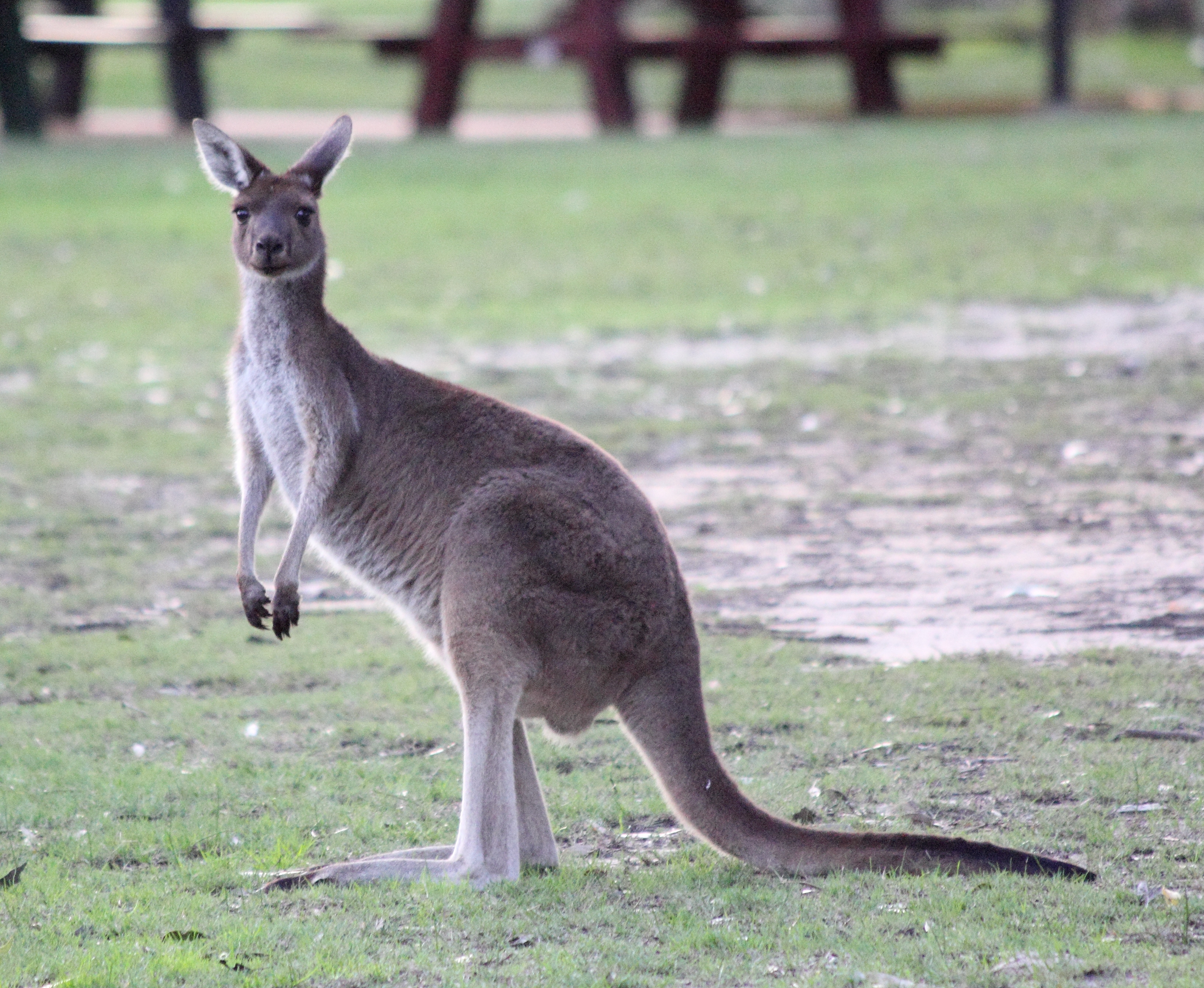 קנגרו